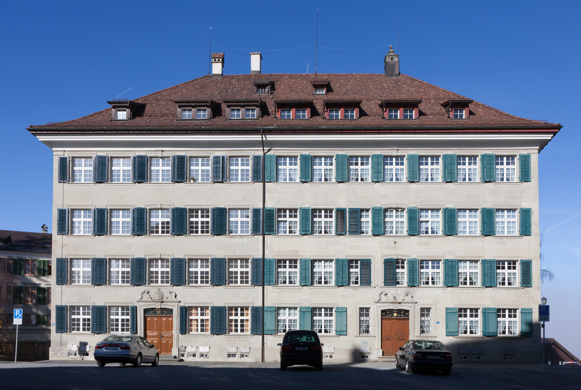 Zellwegscher Doppelpalast am Landsgemeindeplatz in Trogen (AR)